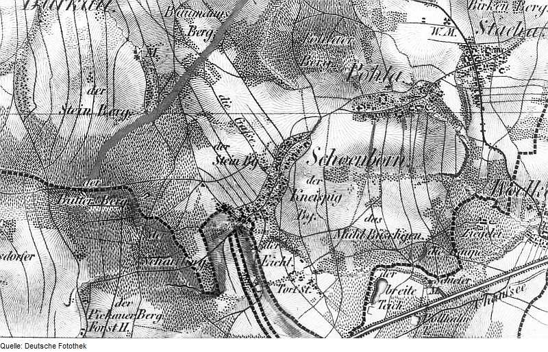 Original image description from the Deutsche Fotothek Bischofswerda-Schönbrunn. Oberreit, Sect. Bautzen, 1844/46